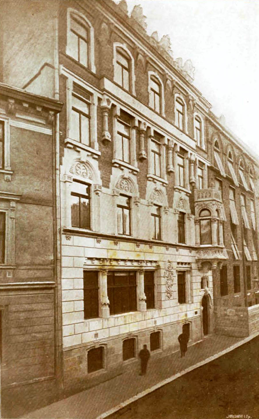 Будинок Політехнічного товариства на вулиці Дудаєва, 9 у Львові, збудований 1906 року. Архітектор Вінцент Равський-молодший (1857—1927).